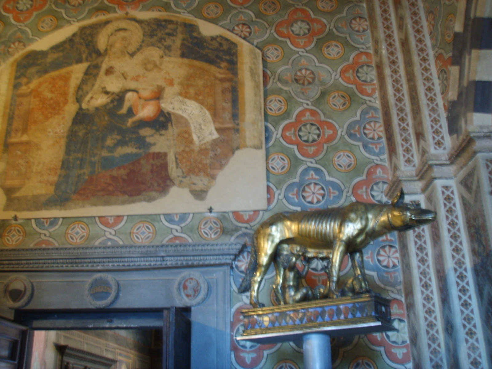 Palazzo Pubblico a Siena. Affresco gotico, e statua della lupa capitolina. Palazzo Pubblico, fresco and Lupa, in Siena, Italy